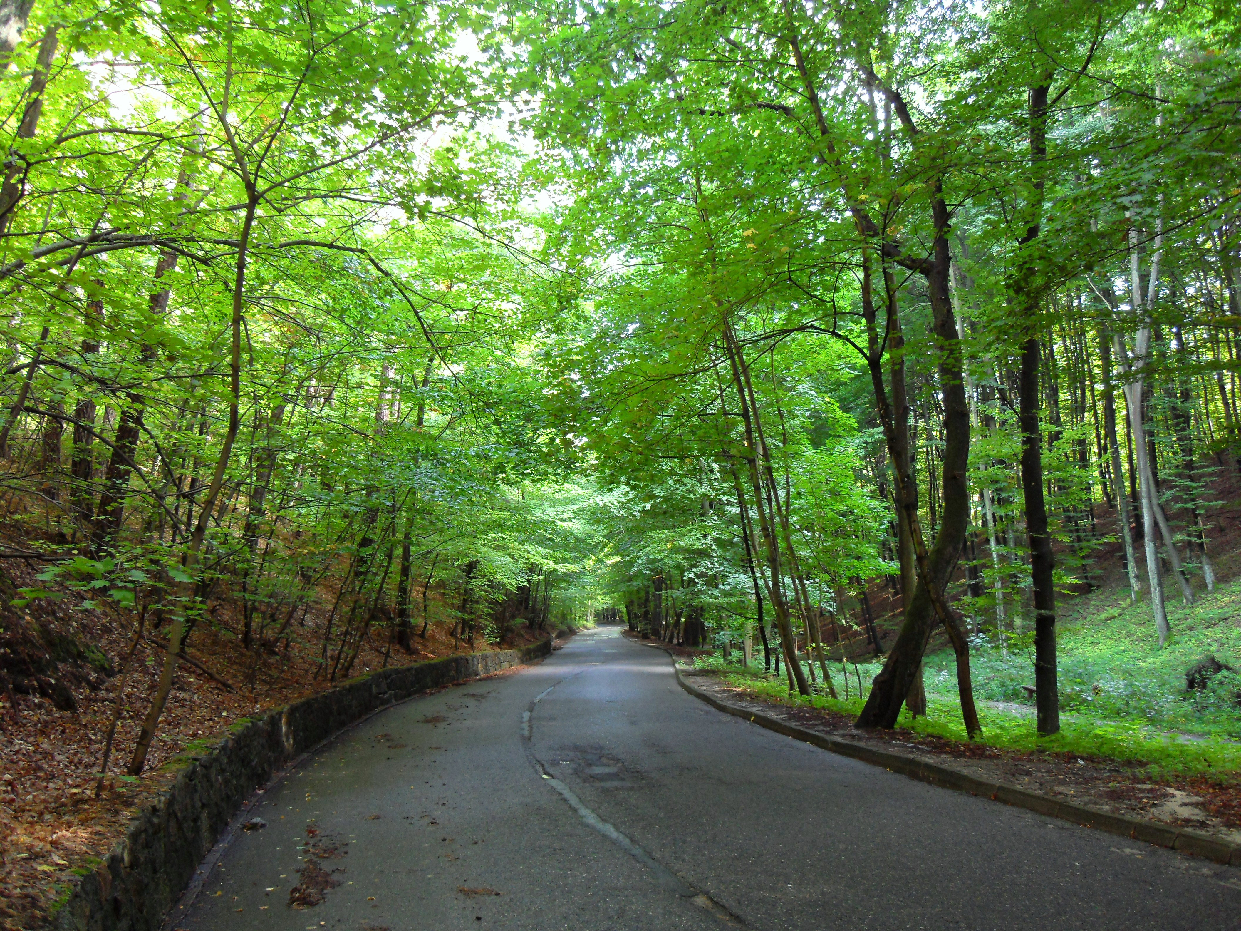 Sopot Przylesie, ul. 23 Marca, Dolina Gołębiewska.